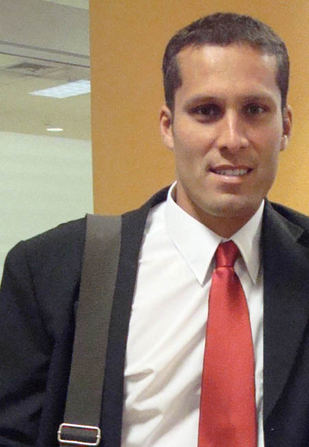 Leao Butron